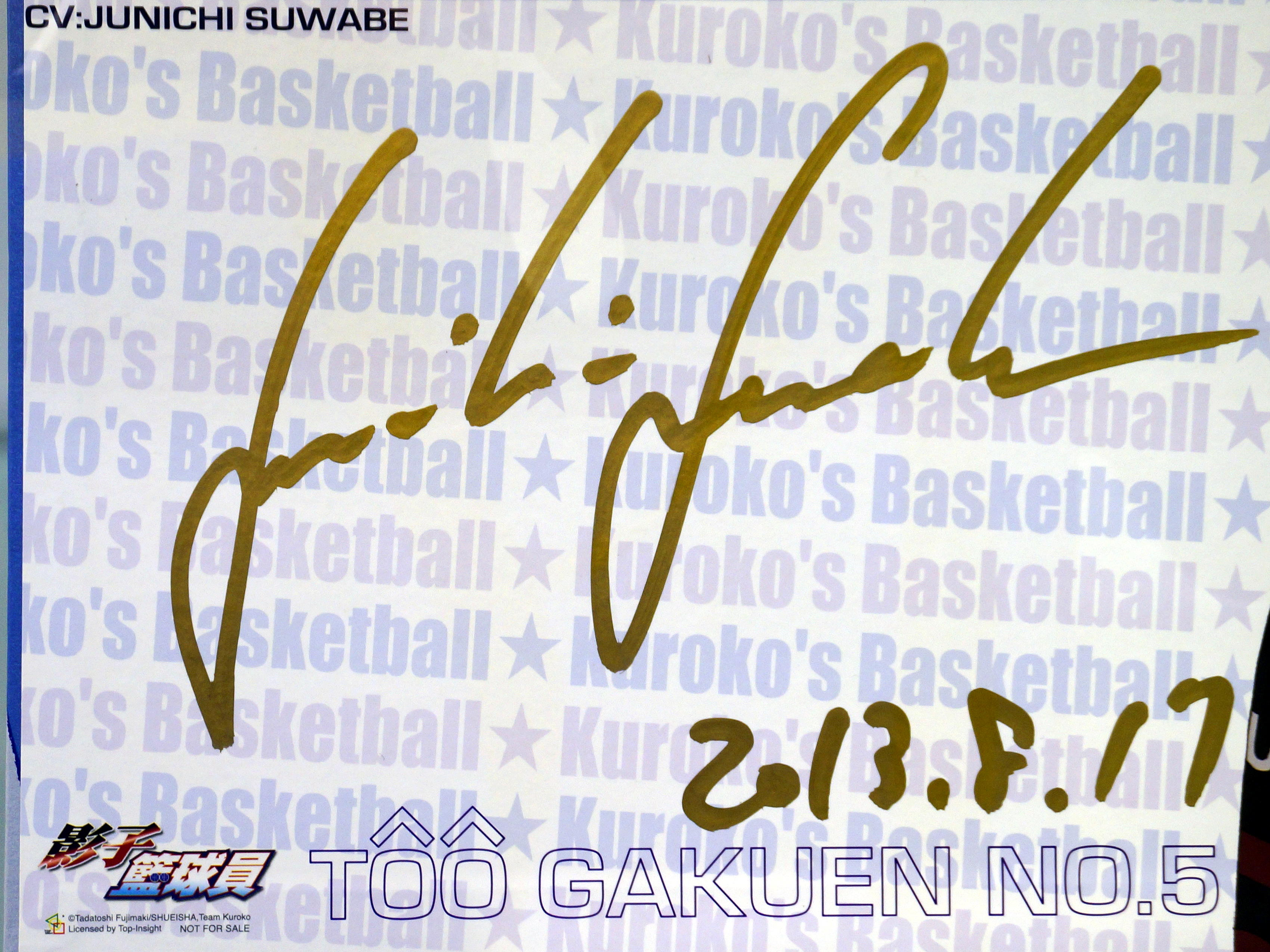 第20屆漫畫博覽會，「漫畫博覽會歷屆名師簽繪手稿展」展示的《影子籃球員》配音員諏訪部順一簽名板。